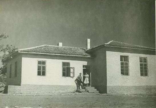 Начално училище „Иван Вазов“ в село Езерец, Добричко.